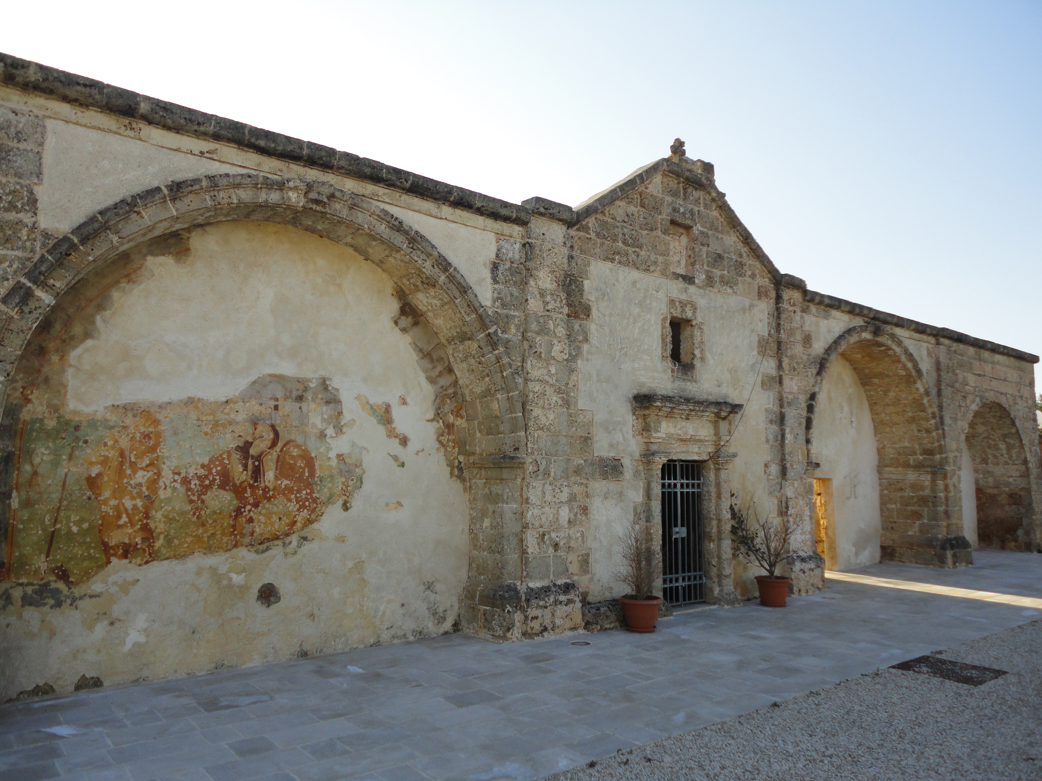 Chiesa di Santa Marina Taviano, Lecce